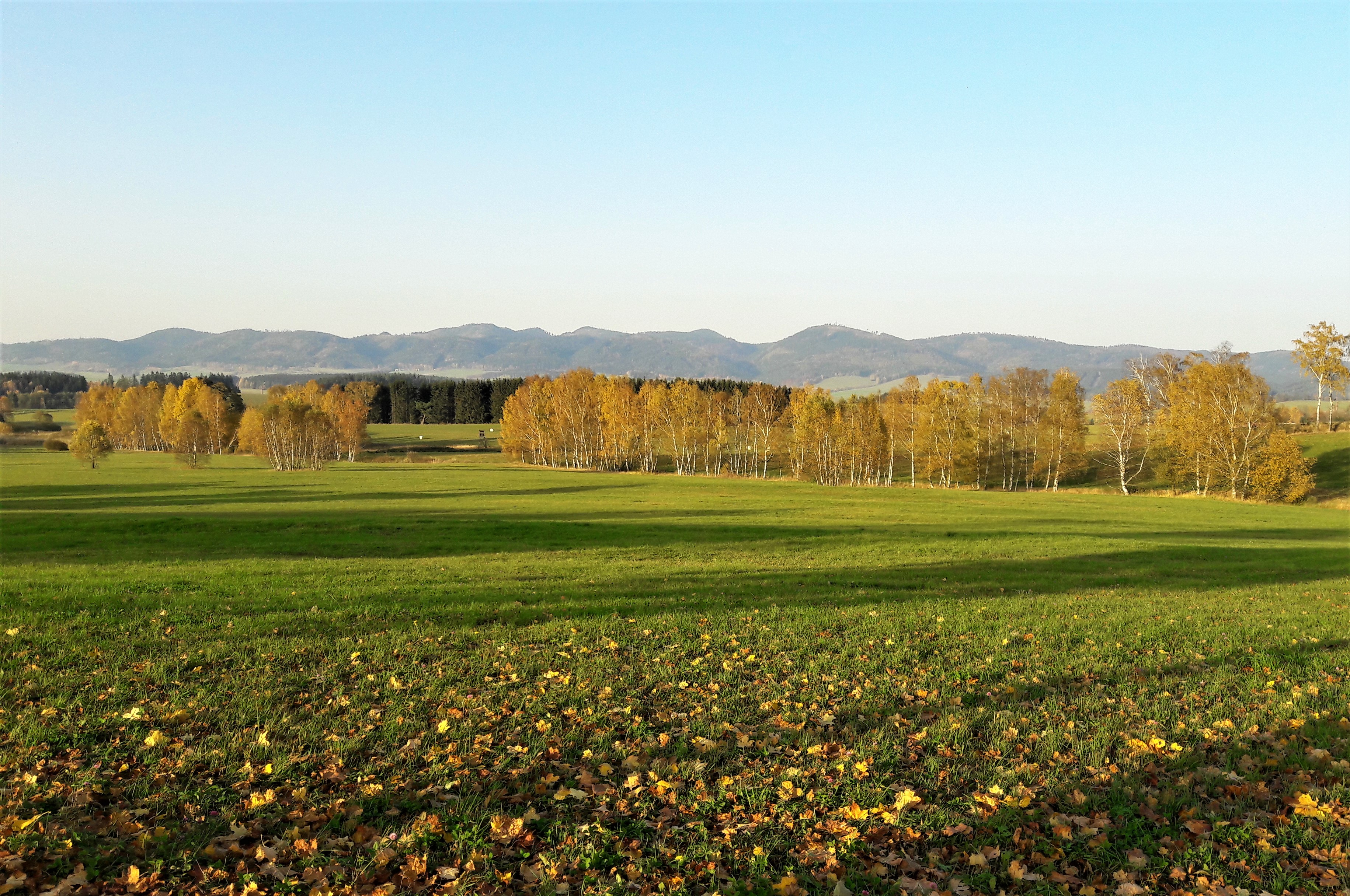 Meziměstská vrchovina